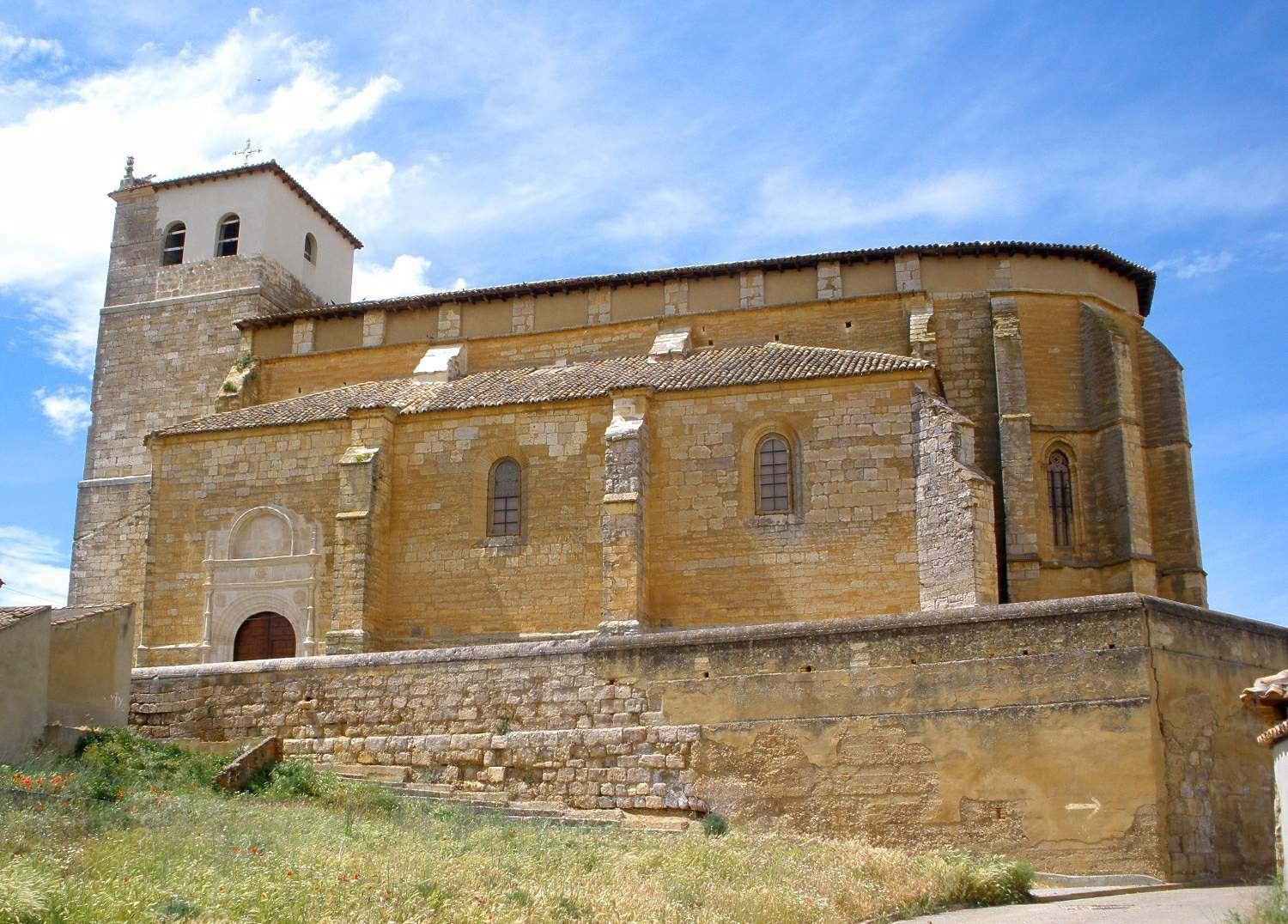 Iglesia de Santa Maria del Castillo, en Frómista (Palencia)